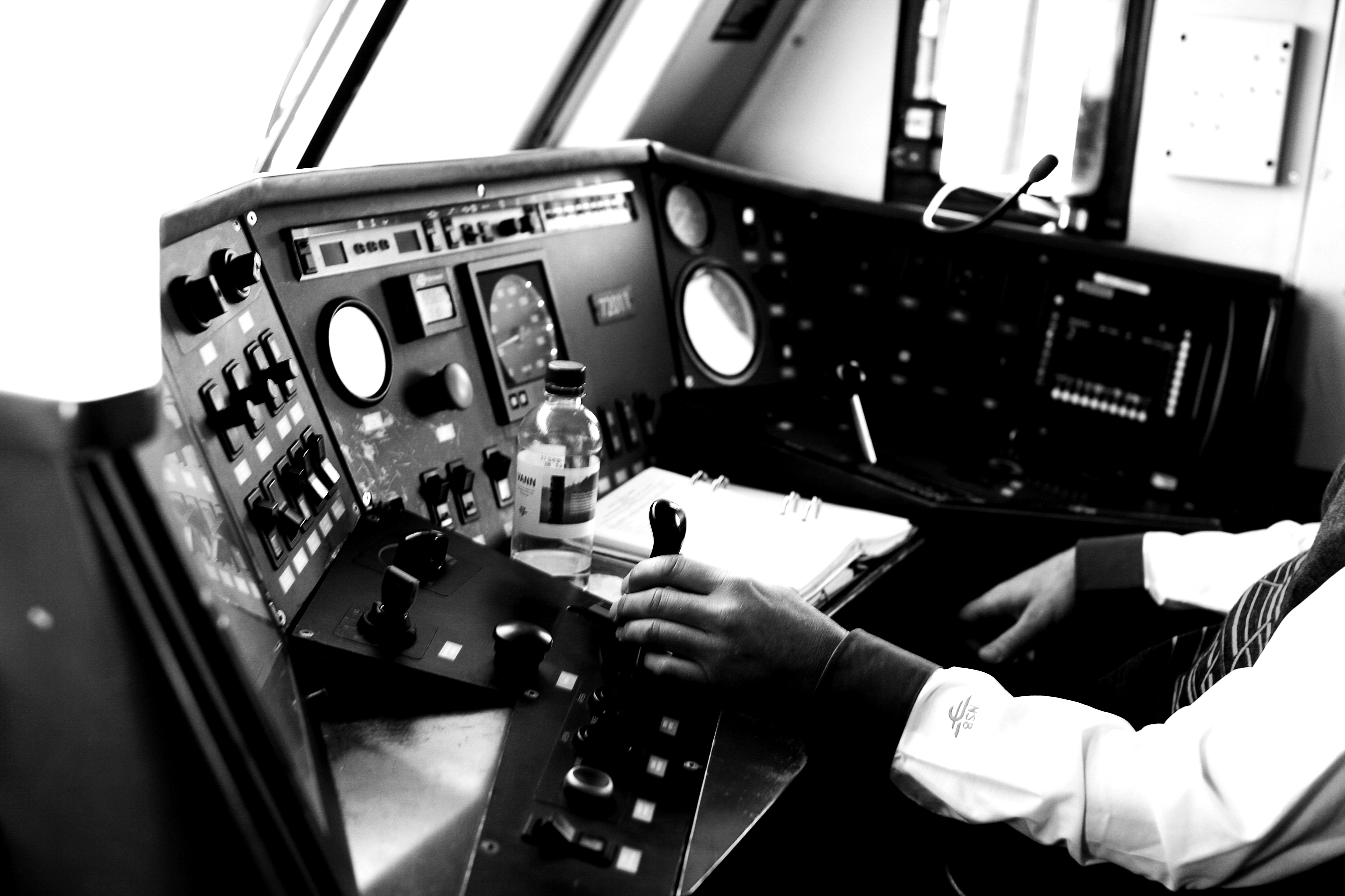 Togfører